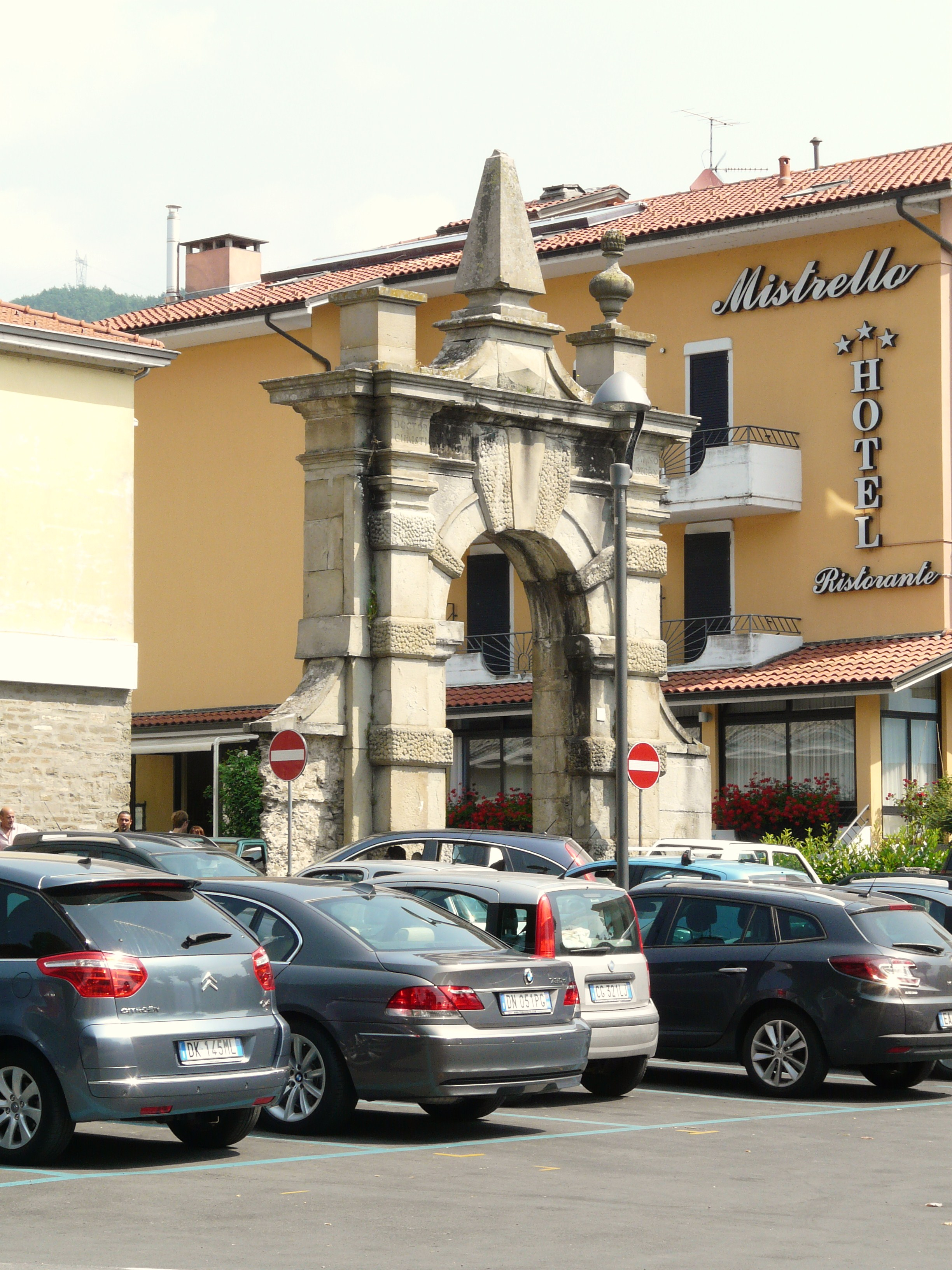 Arco di Piazza Farnese, Borgo Val di Taro, Emilia Romagna, Italia